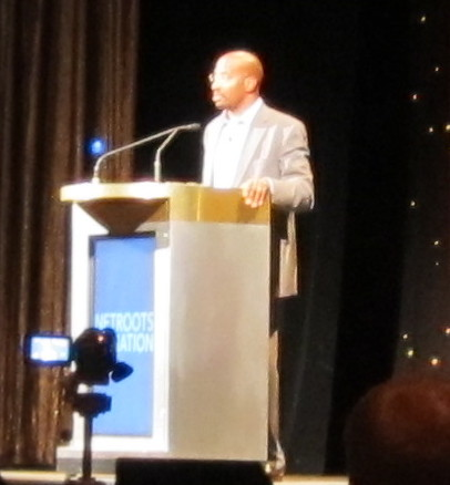 IMG_1913_1